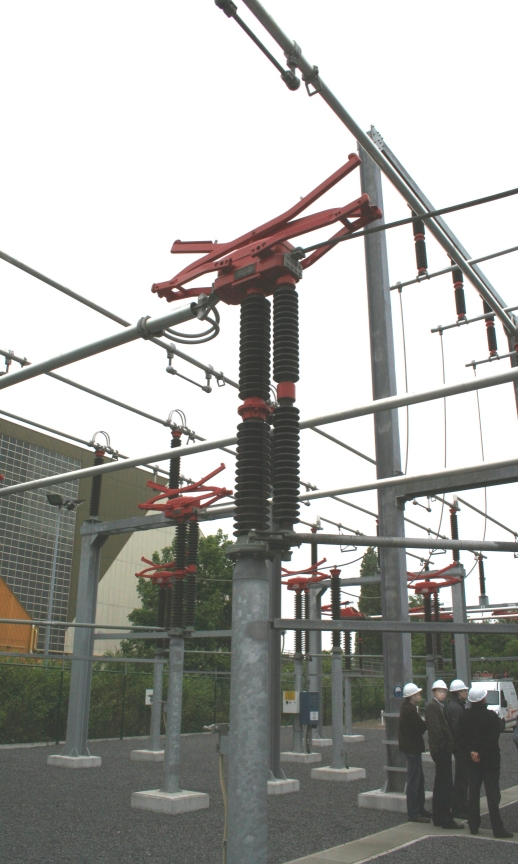 Een pantograaf type scheidingsschakelaar op 150 kV, ELIA opleidingspost Edison